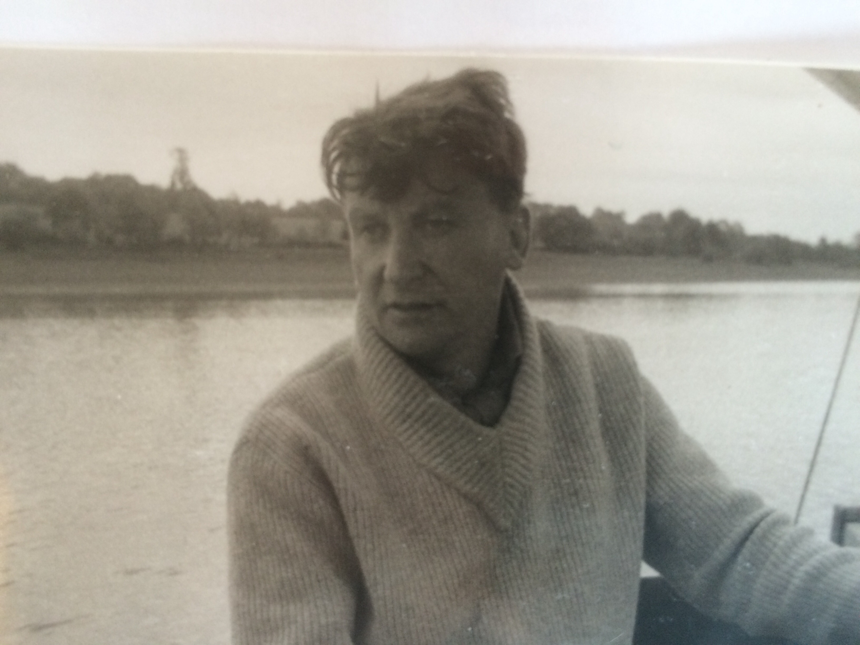 Portrait Pierre Chevalier, cinéaste